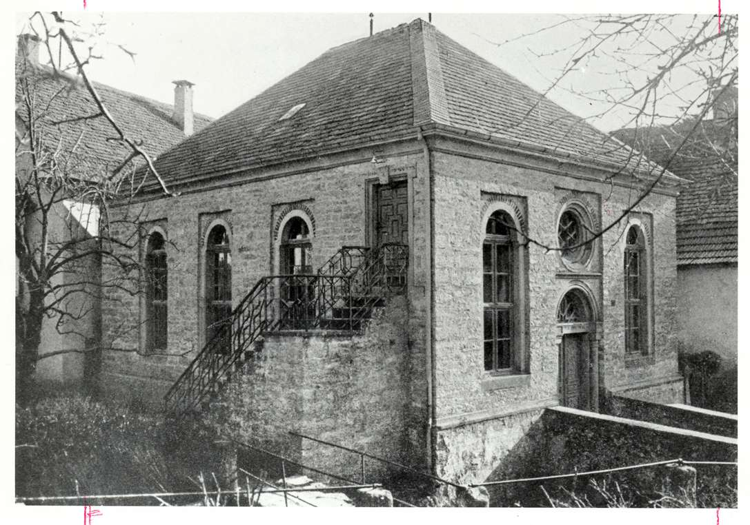 Synagoge (Olnhausen) Nutzungsbedingungen ausdrücklich auch für Wikipedia (siehe: [1]